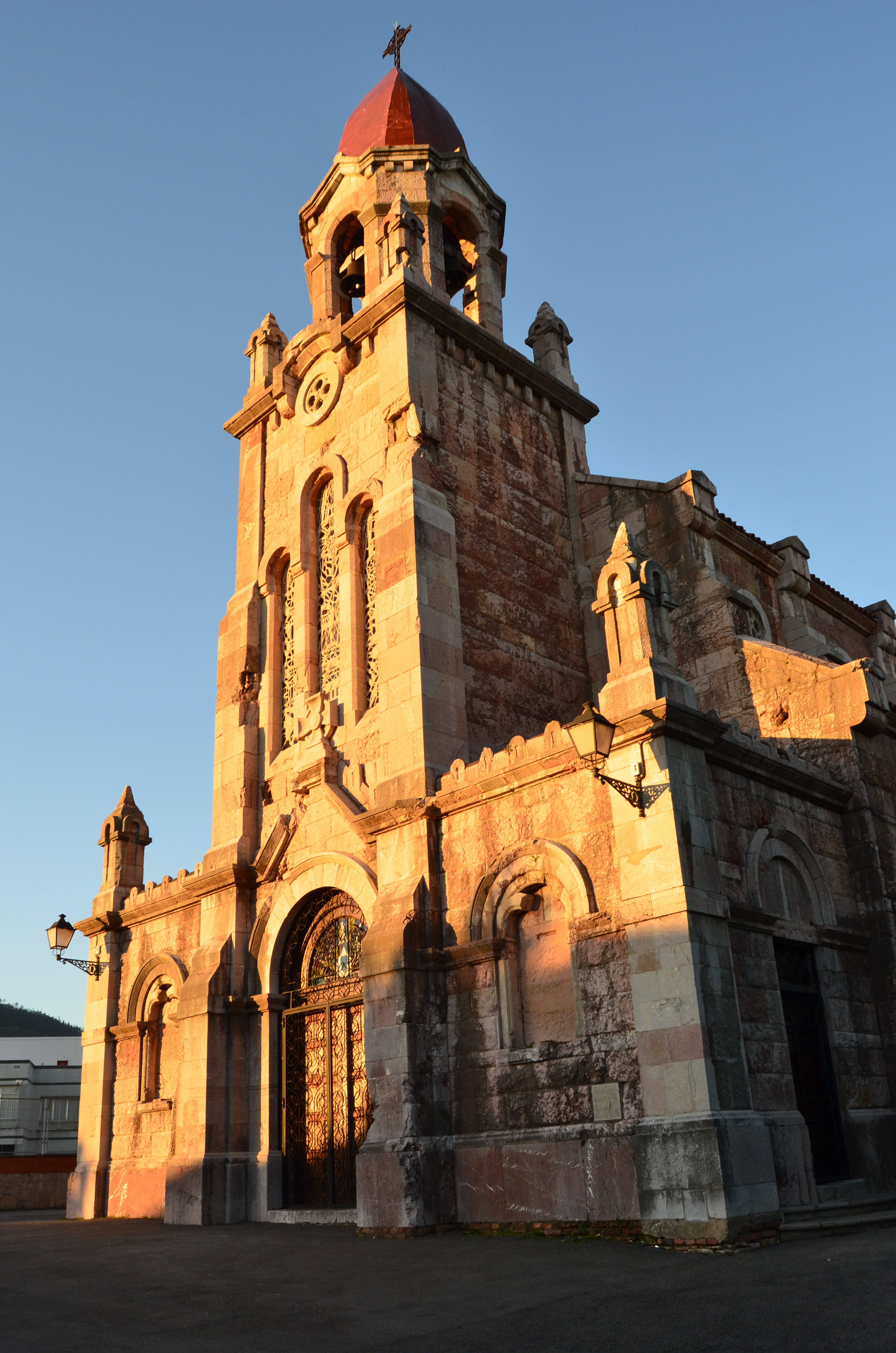 Saint Peter of the Arcs